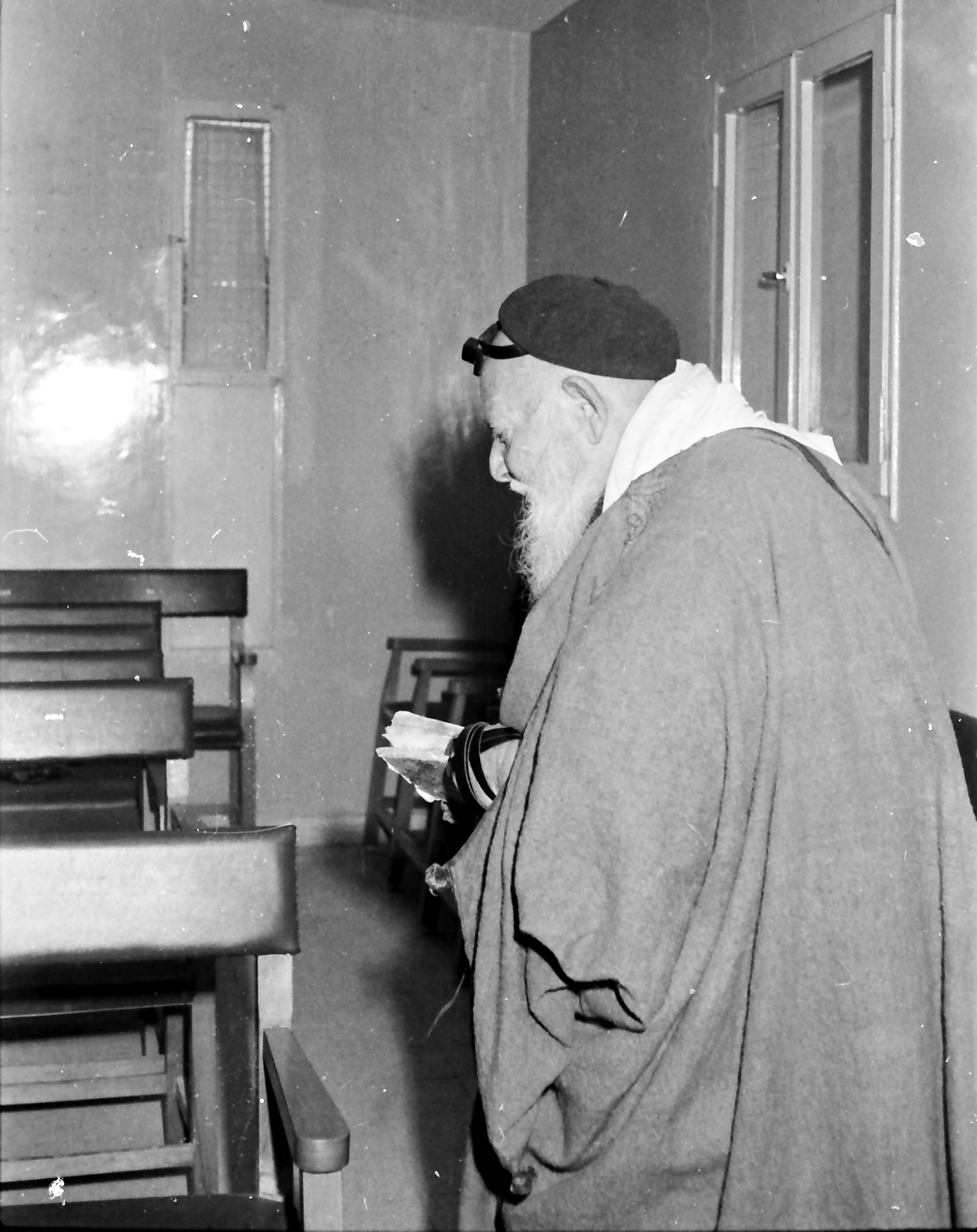 הרב יוסף סוסו הכהן מתפלל בבית הכנסת